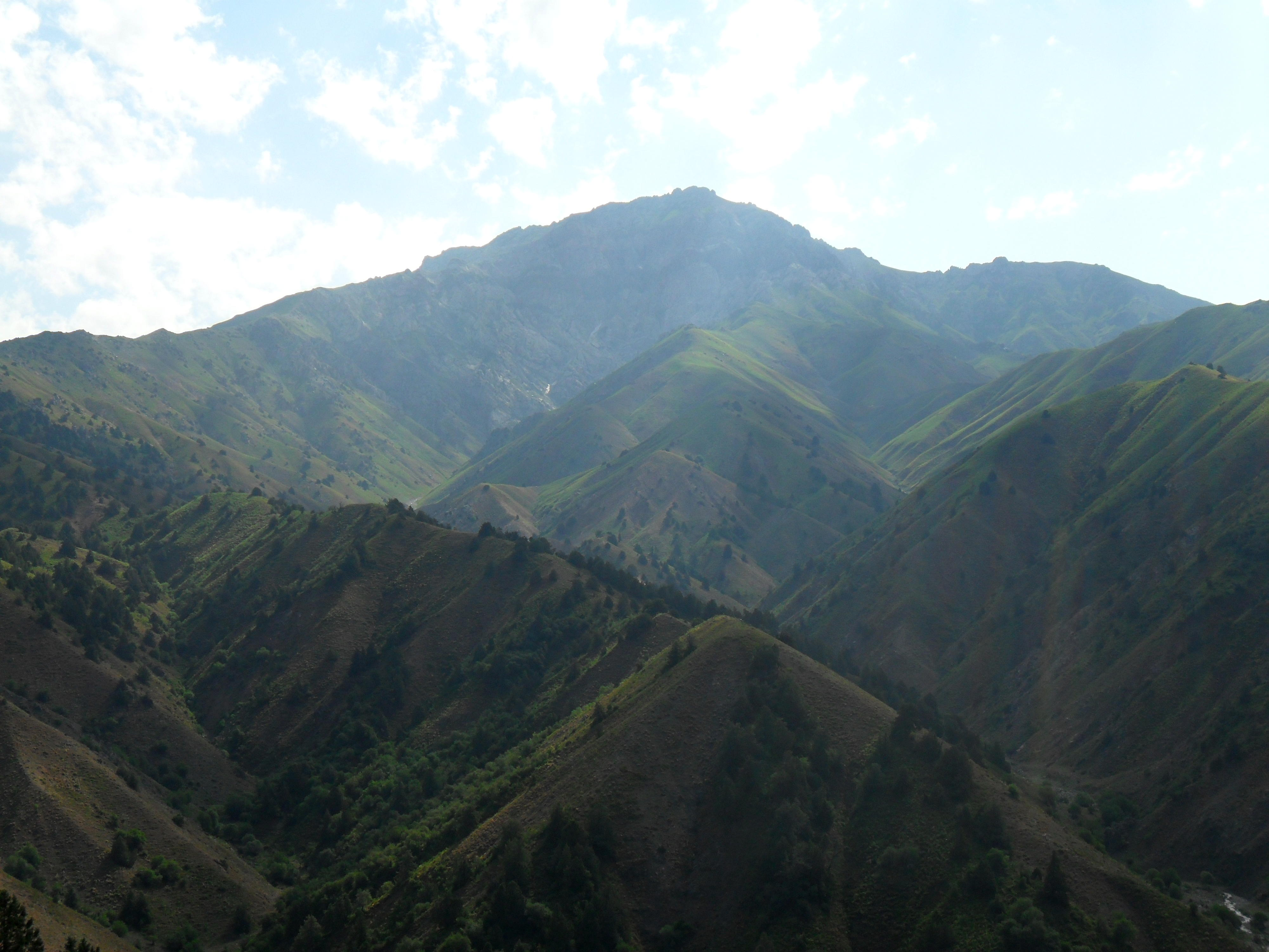 Долина реки Бельдерсай, вид с перевала Чет-Кумбель. На заднем плане гора Чимган. Бостанлыкский район, Ташкентская область, Республика Узбекистан.